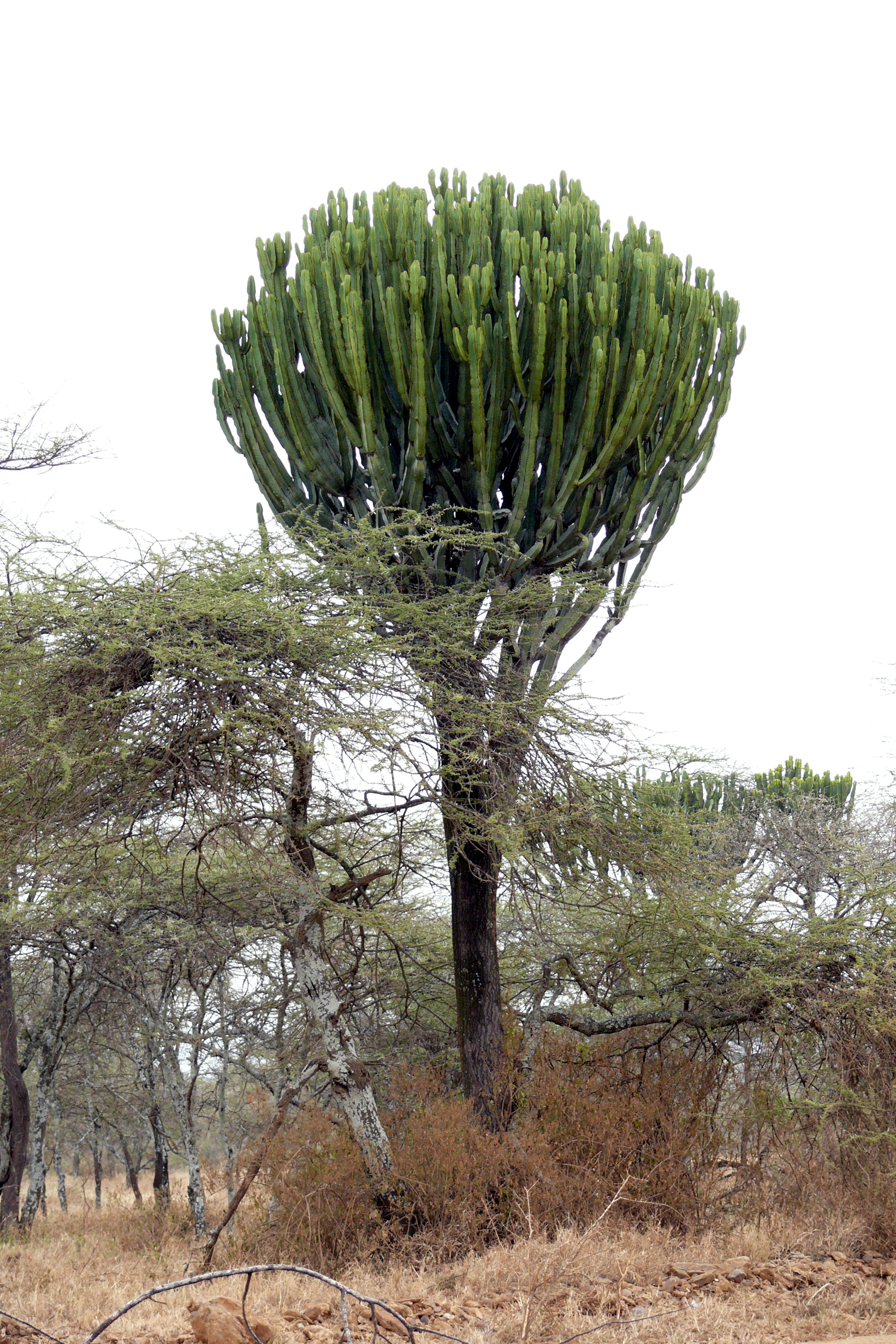 Euphorbia candelabrum, Serengeti, Tanzania